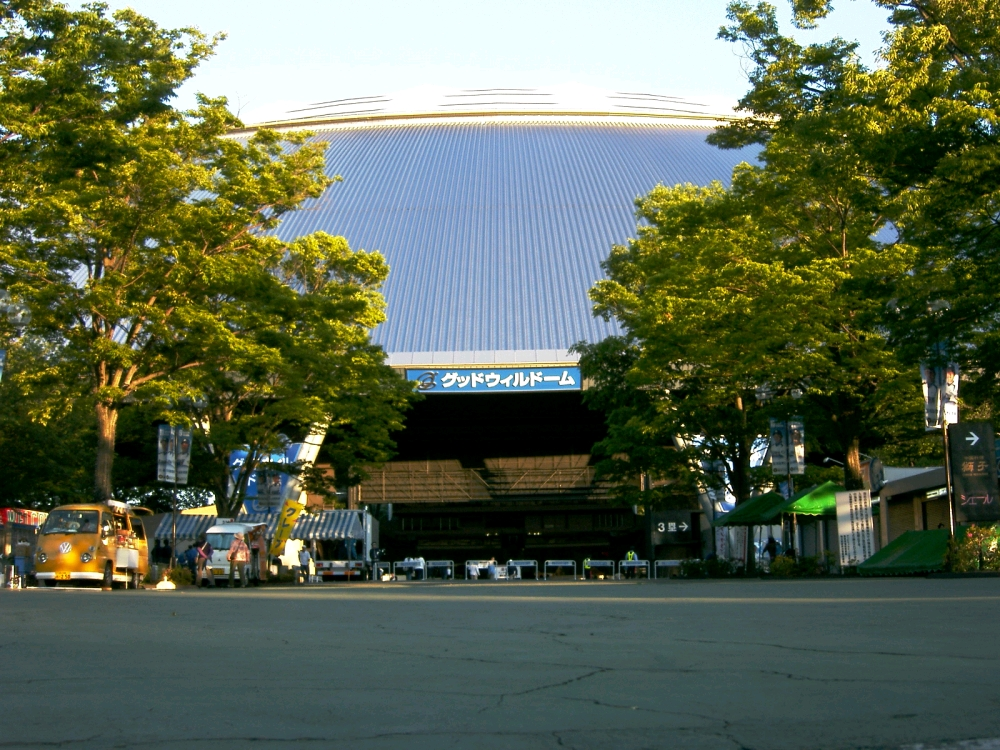 “Seibu Dome” Seibu Lions professional baseball team located in Tokorozawa, Saitama, Japan. “西武ドーム” 日本の埼玉県所沢市にあるドーム式野球場。日本のプロ野球パリーグに加盟する、西武ライオンズのホーム球場でもある。